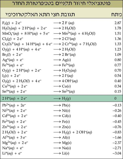 טבלת פוטנציאלי חיזור של חצאי תאים אלקטרוכימיים. תרגום מוויקיפדיה האנגלית.